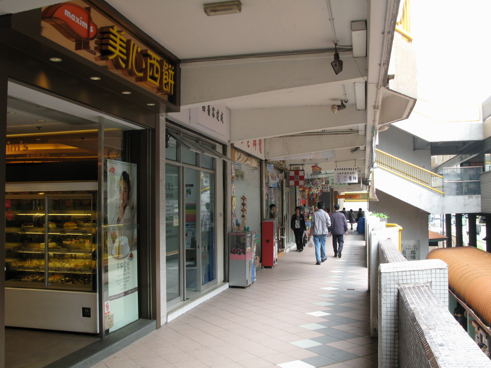 Yau Oi Estate Shopping Arcade in 2009友愛邨